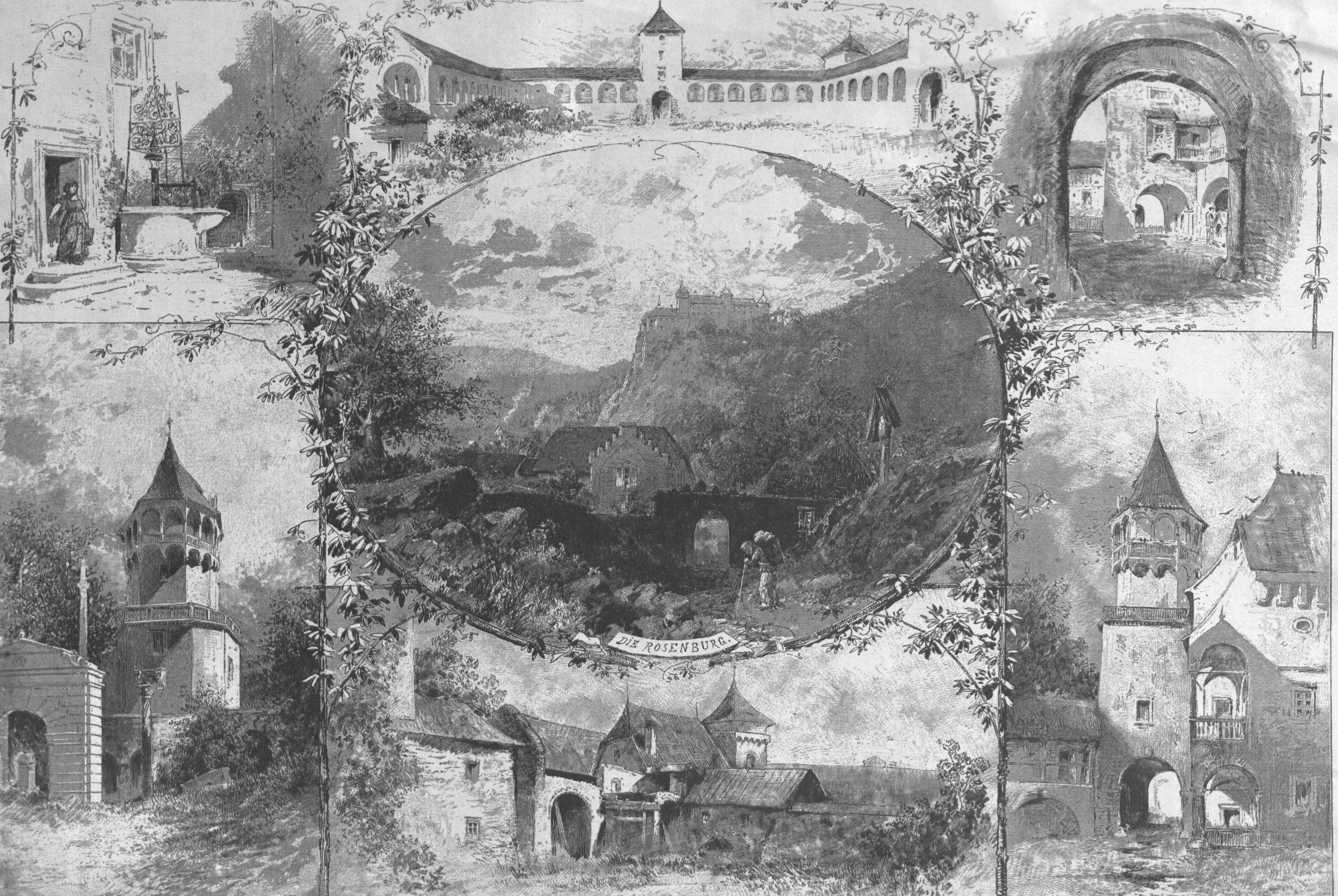 Zeichnung der Rosenburg in Niederösterreich